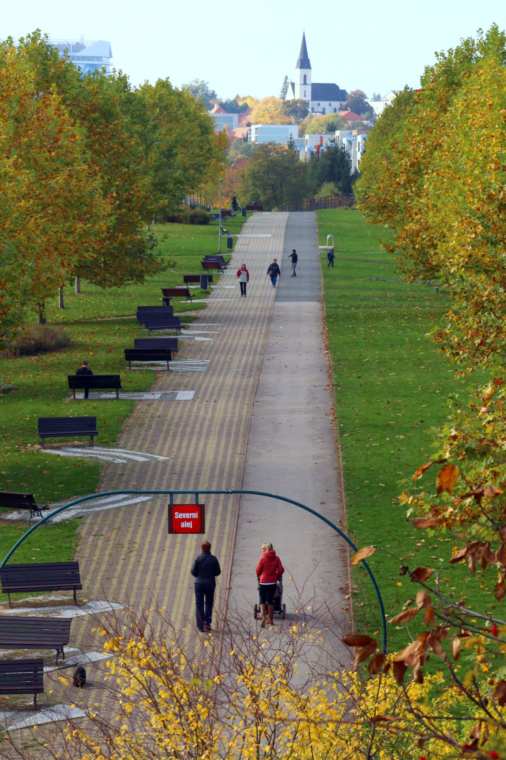 Centrální park Lužiny (Praha-Stodůlky)